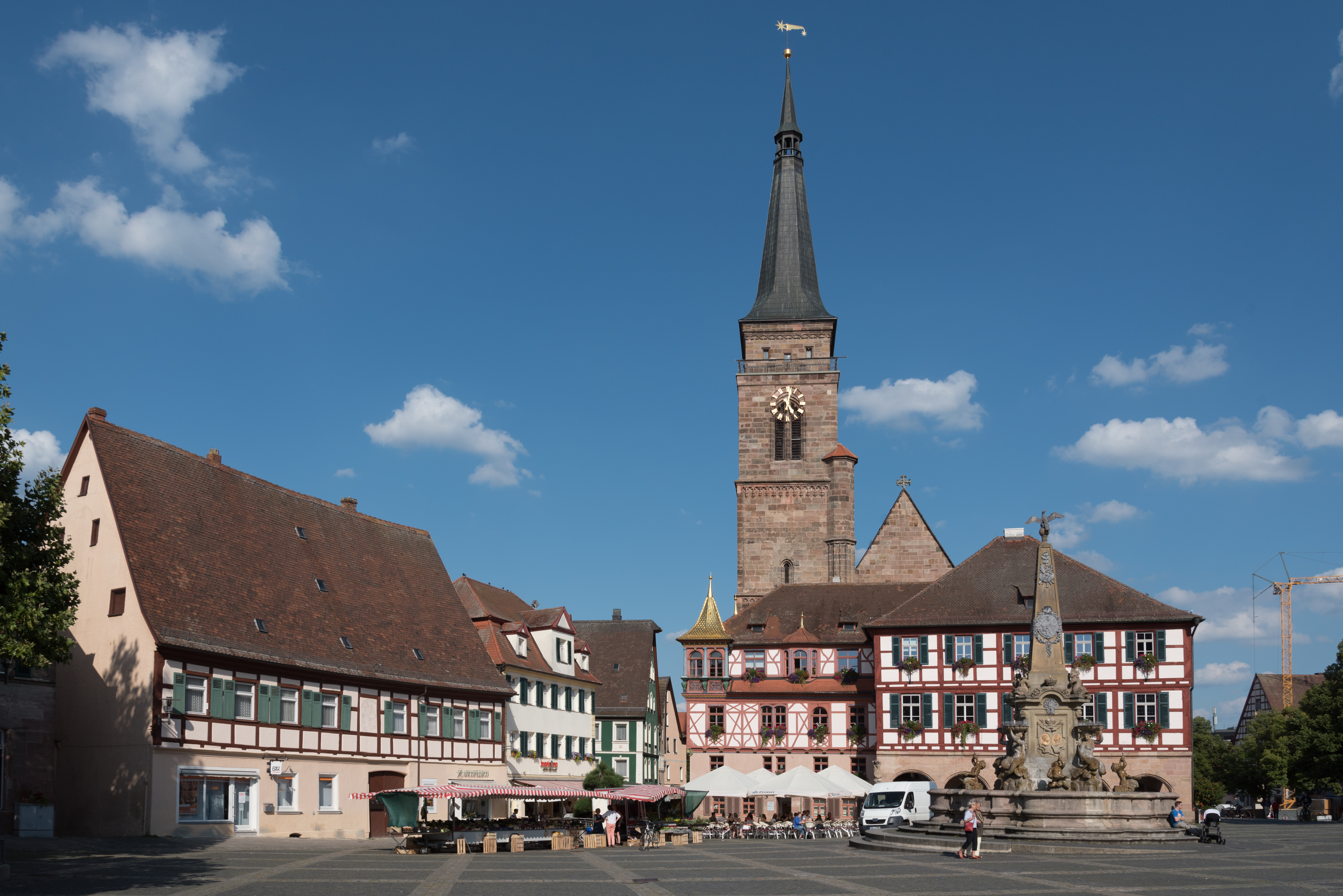 Schwabach, Köngigsplatz 8, 4, 2, 1b, 1